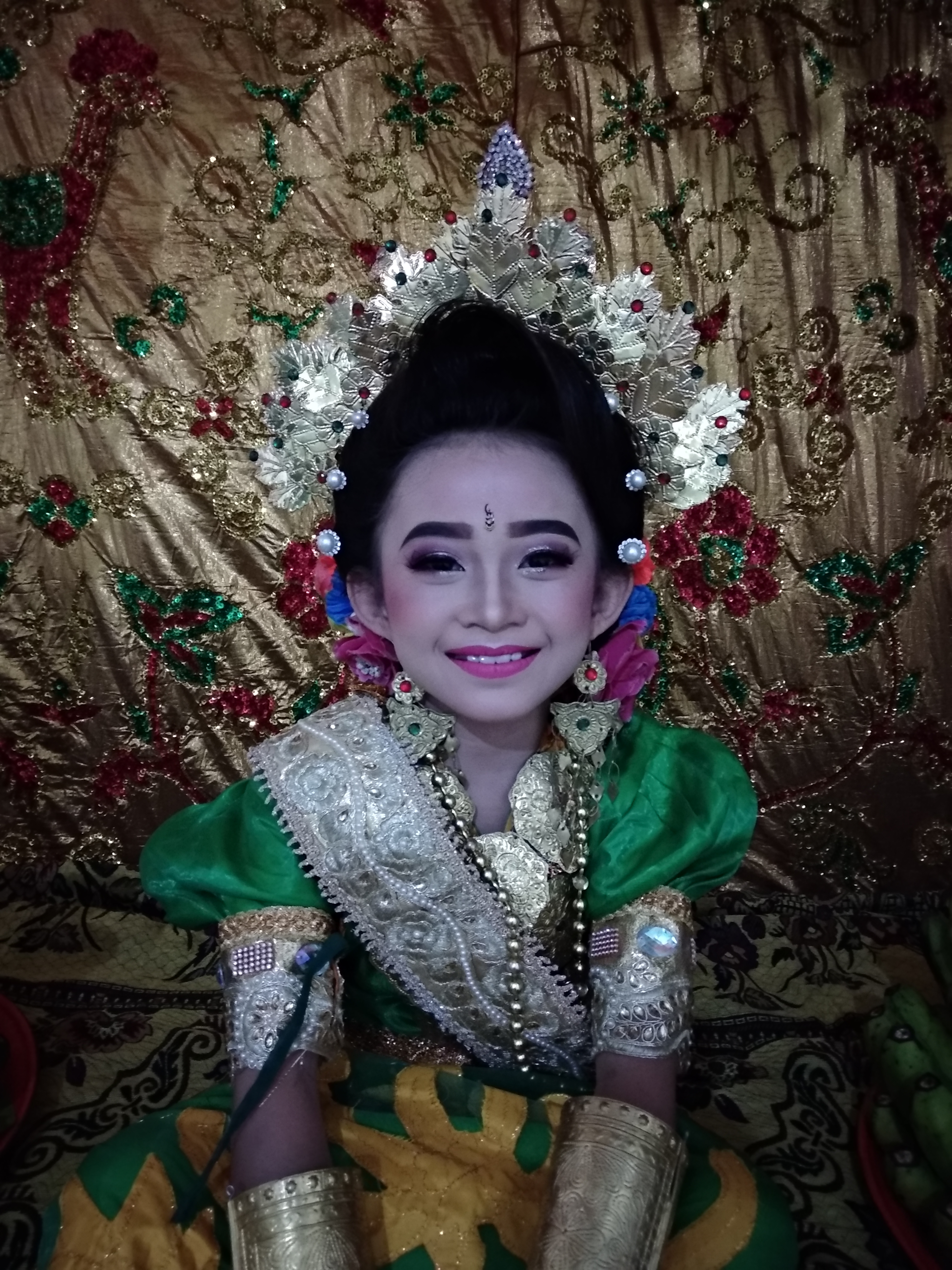 Perayaan sunatan pada suku Bugis Makassar menggunakan baju adat yang disebut baju Bodi.